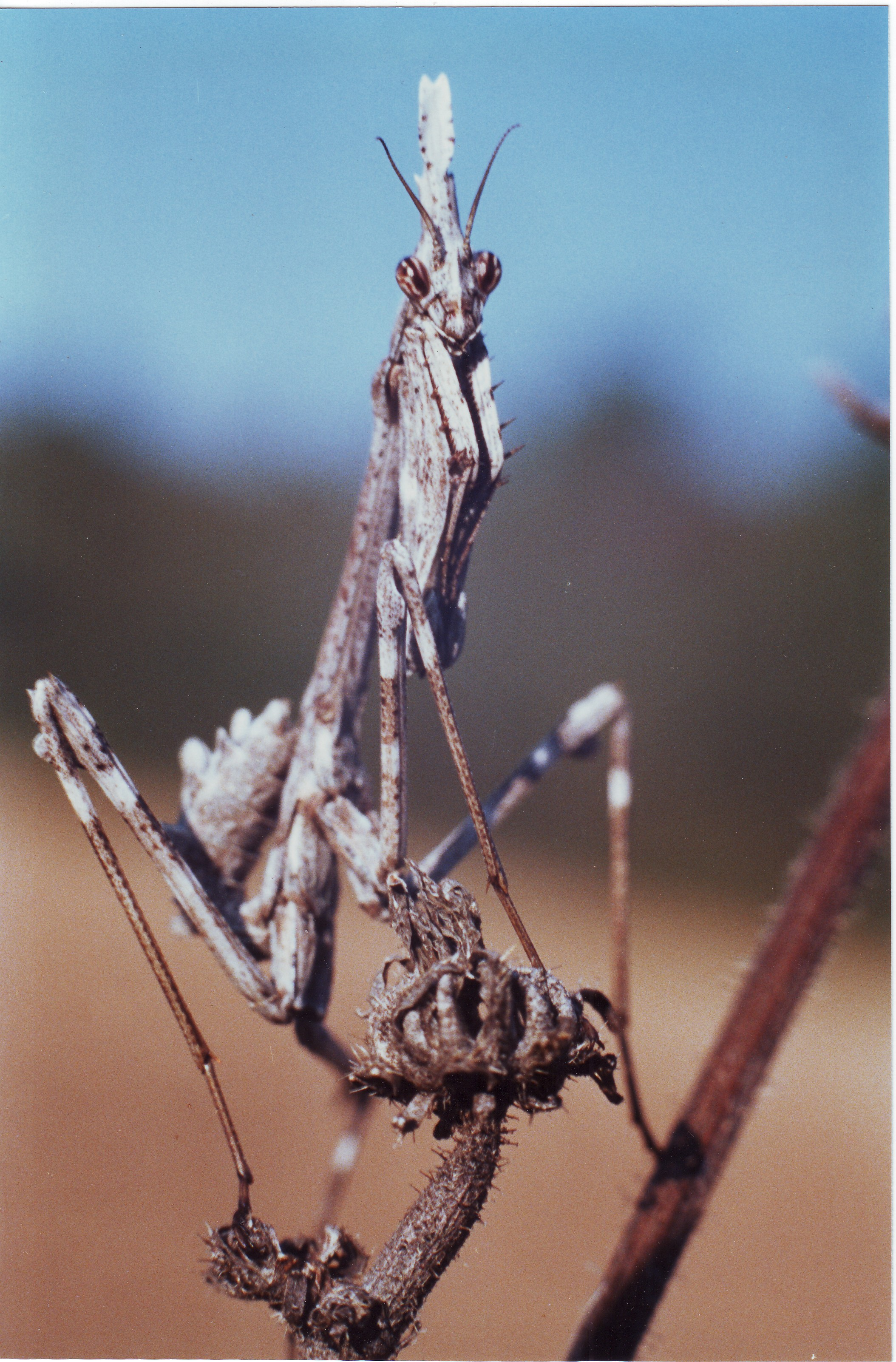 Jeune Empuse en Provence prête à hiverner. Mois de Novembre.